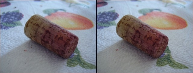 Tipica Immagine Stereoscopica Affiancata